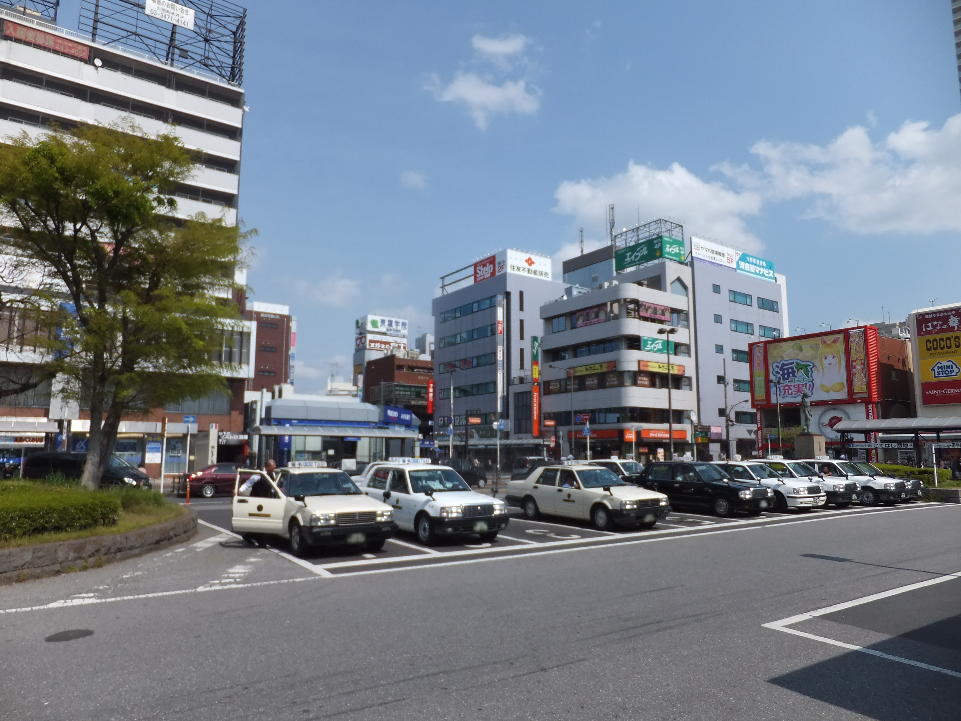 稲毛駅東口駅前広場